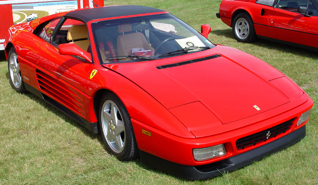 348ts